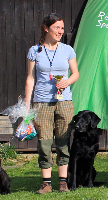 Zita Červenková